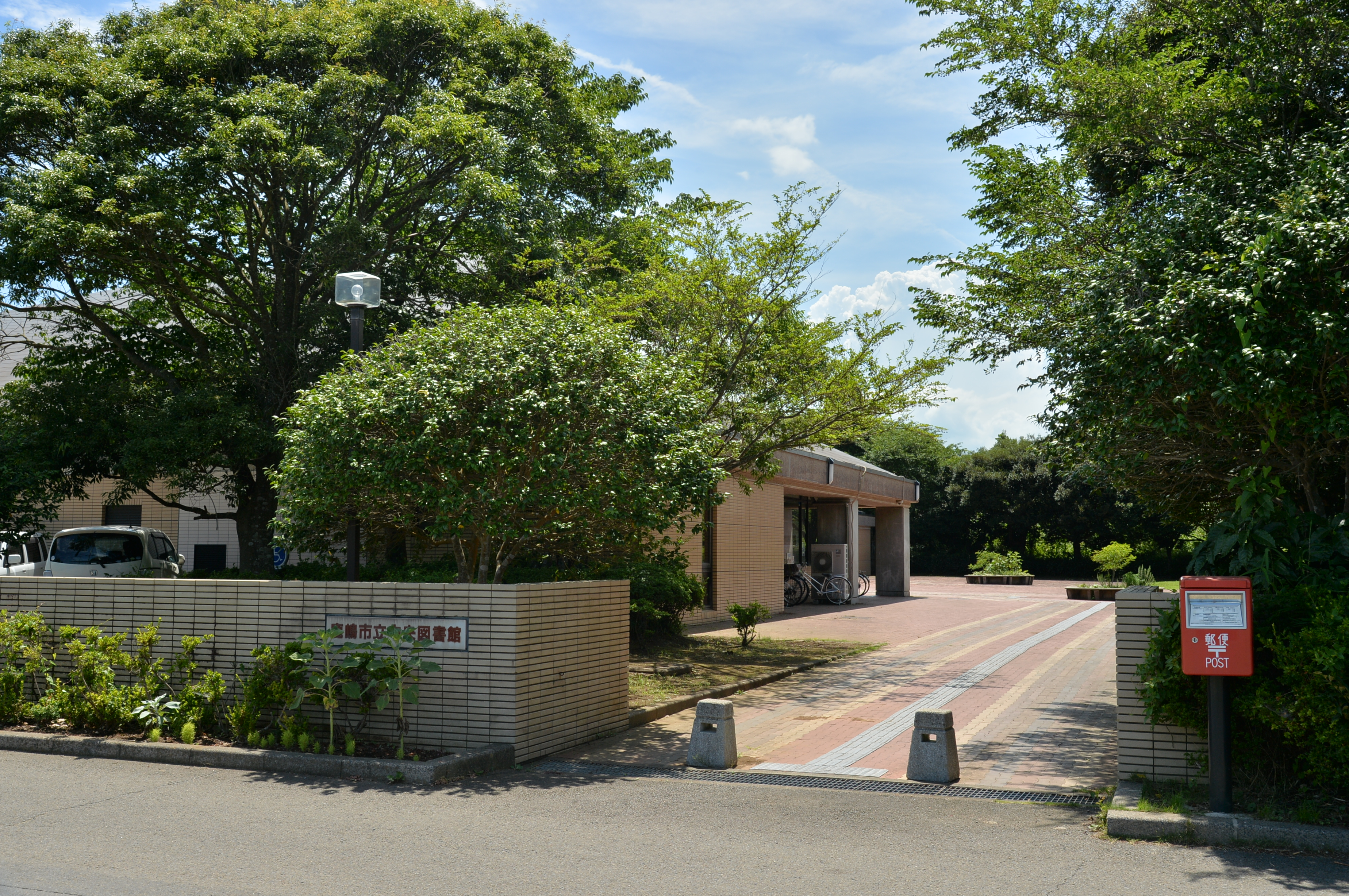 鹿嶋中央図書館の正門